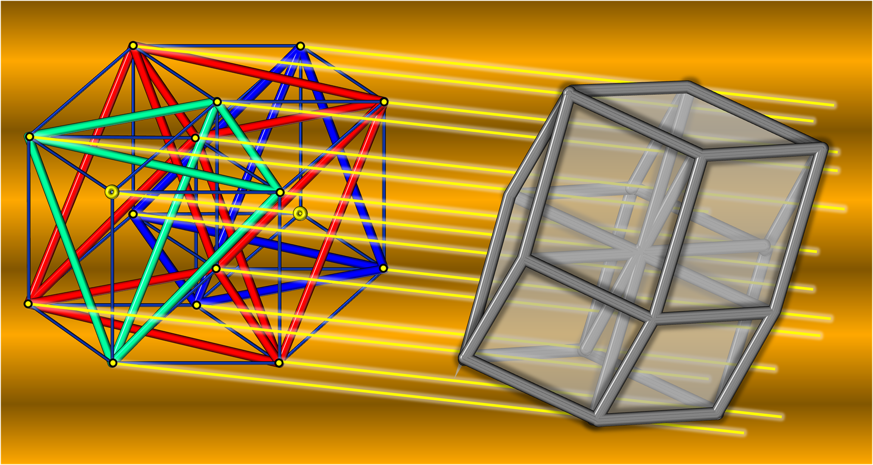 L'ombra ortoassiale di un Tesseratto 4D è rappresentata da un Dodecaedro Rombico. Essa risulta dall'inviluppo esterno delle sezioni ortoassiali del tesseratto: due Tetraedri regolari ed un Ottaedro regolare.